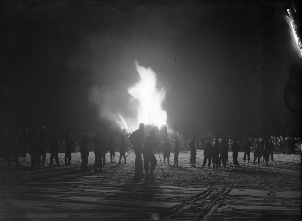 Nous apercevons les silhouettes d'un groupe de personnes regardant un feu de joie au cours d'une fête de nuit sur le Mont-Royal à Montréal.